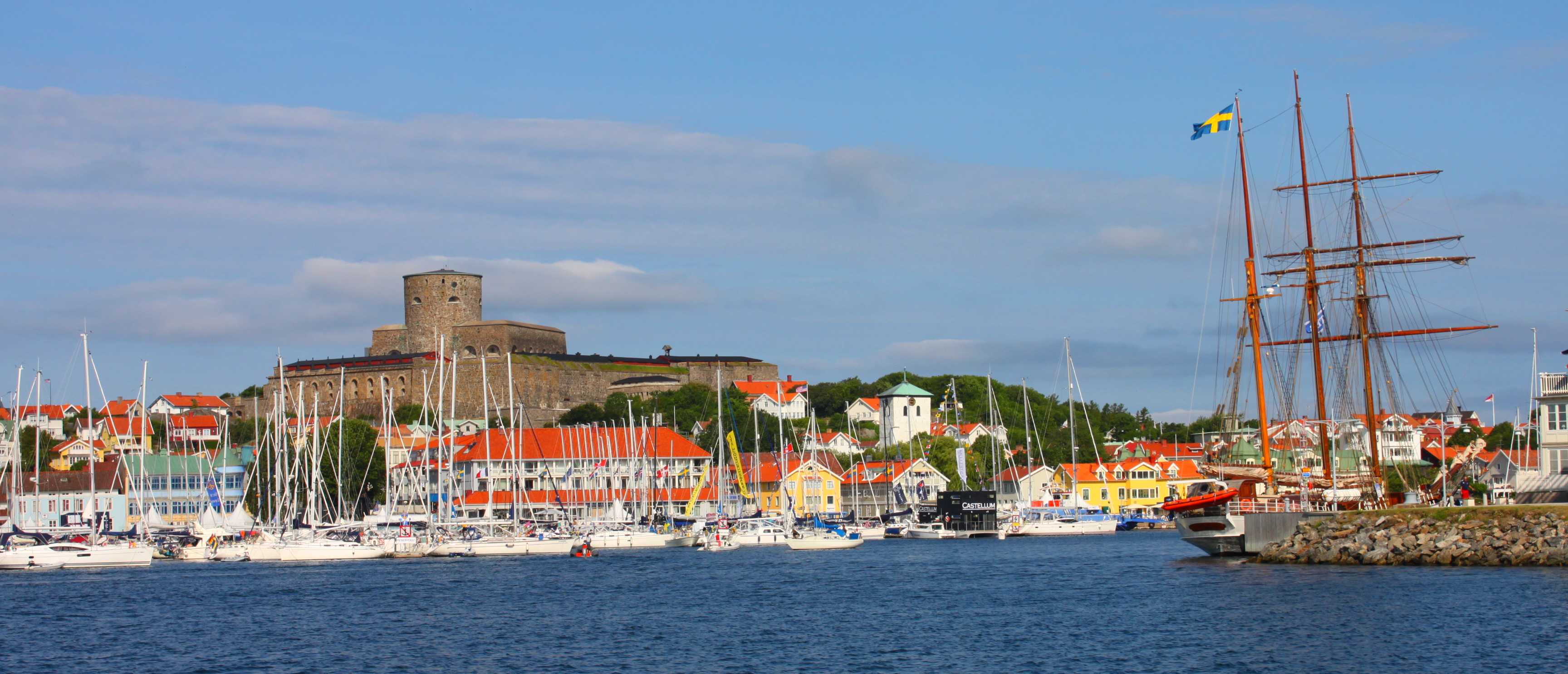 Marstrand vom Schiff aus gesehen. Links die Insel Marstrandsö mit der Festung Carlsten, rechts beim Segelschiff ist die Insel Koö